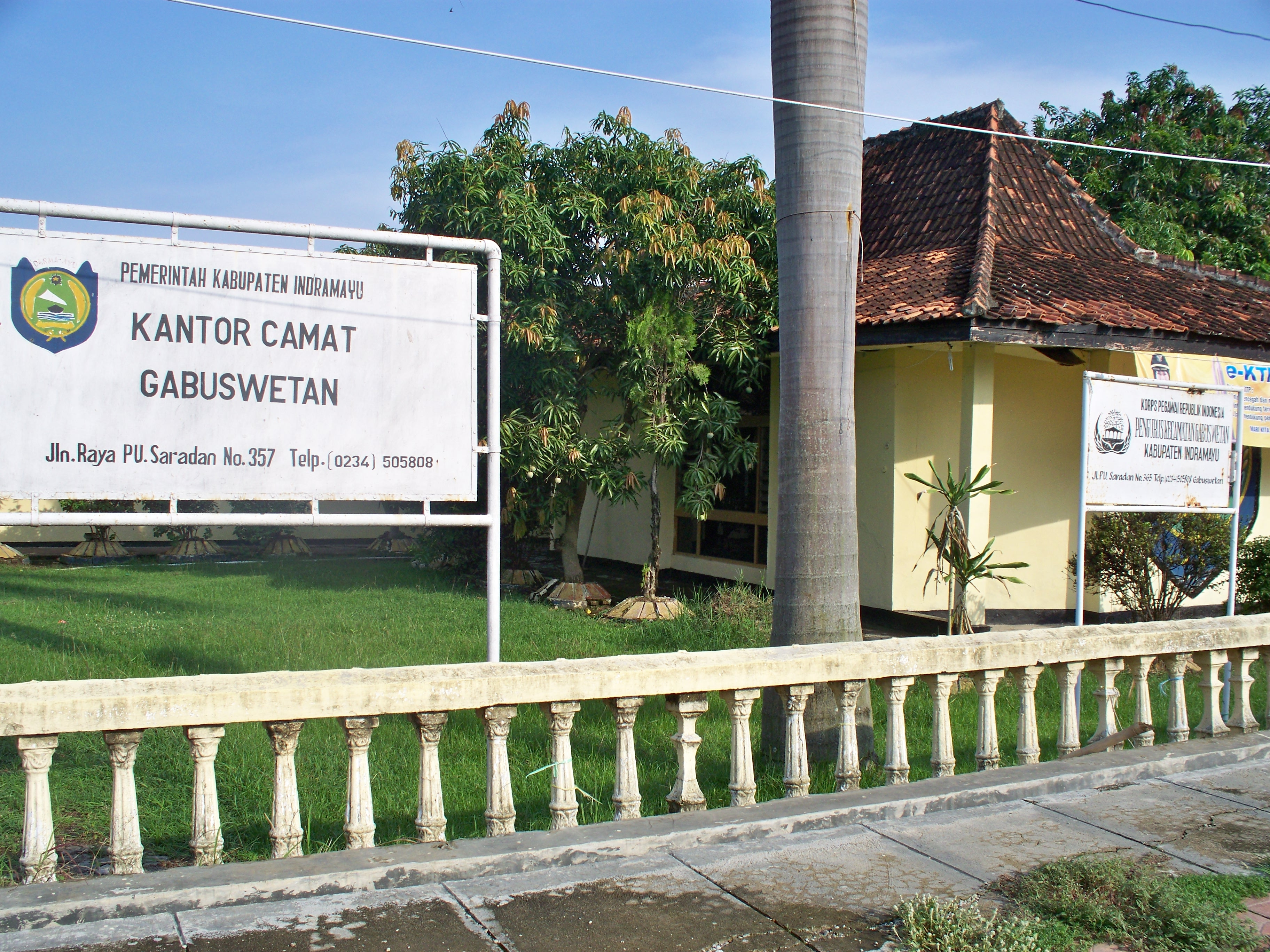 KANTOR CAMAT GABUS WETAN